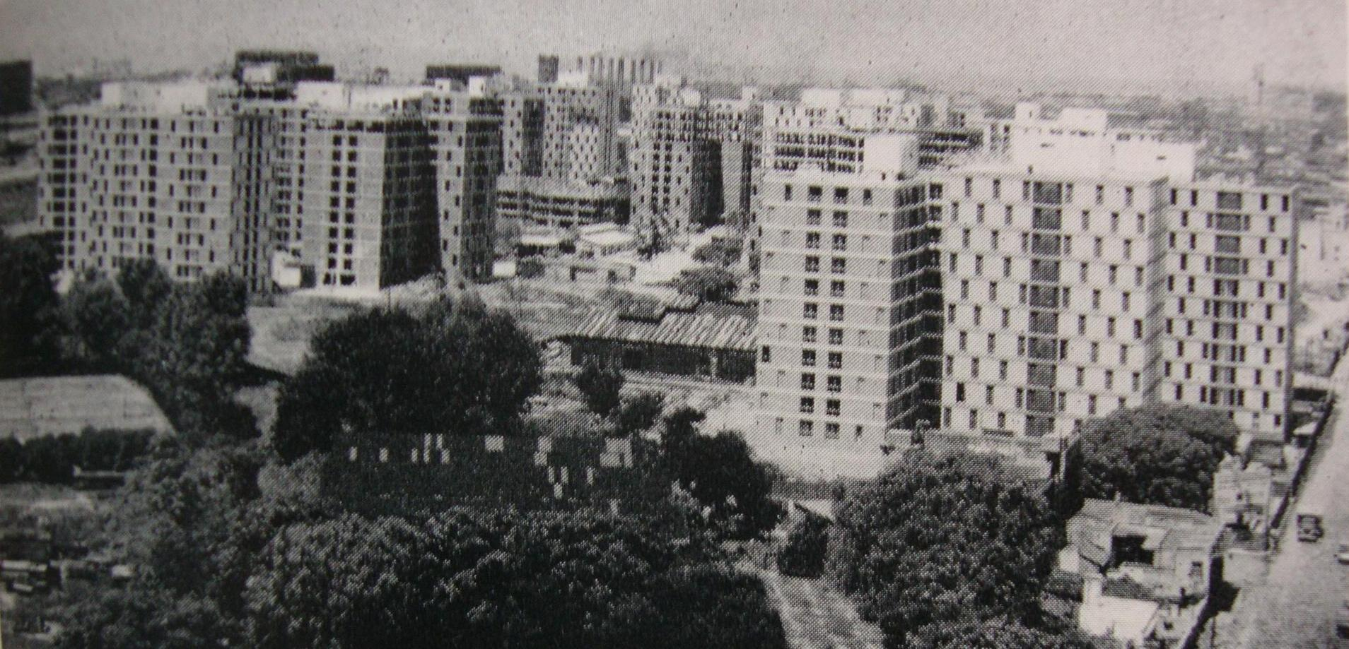 El Conjunto Habitacional Catalinas Sur, en construcción hacia 1965. La Boca, Buenos Aires, Argentina.